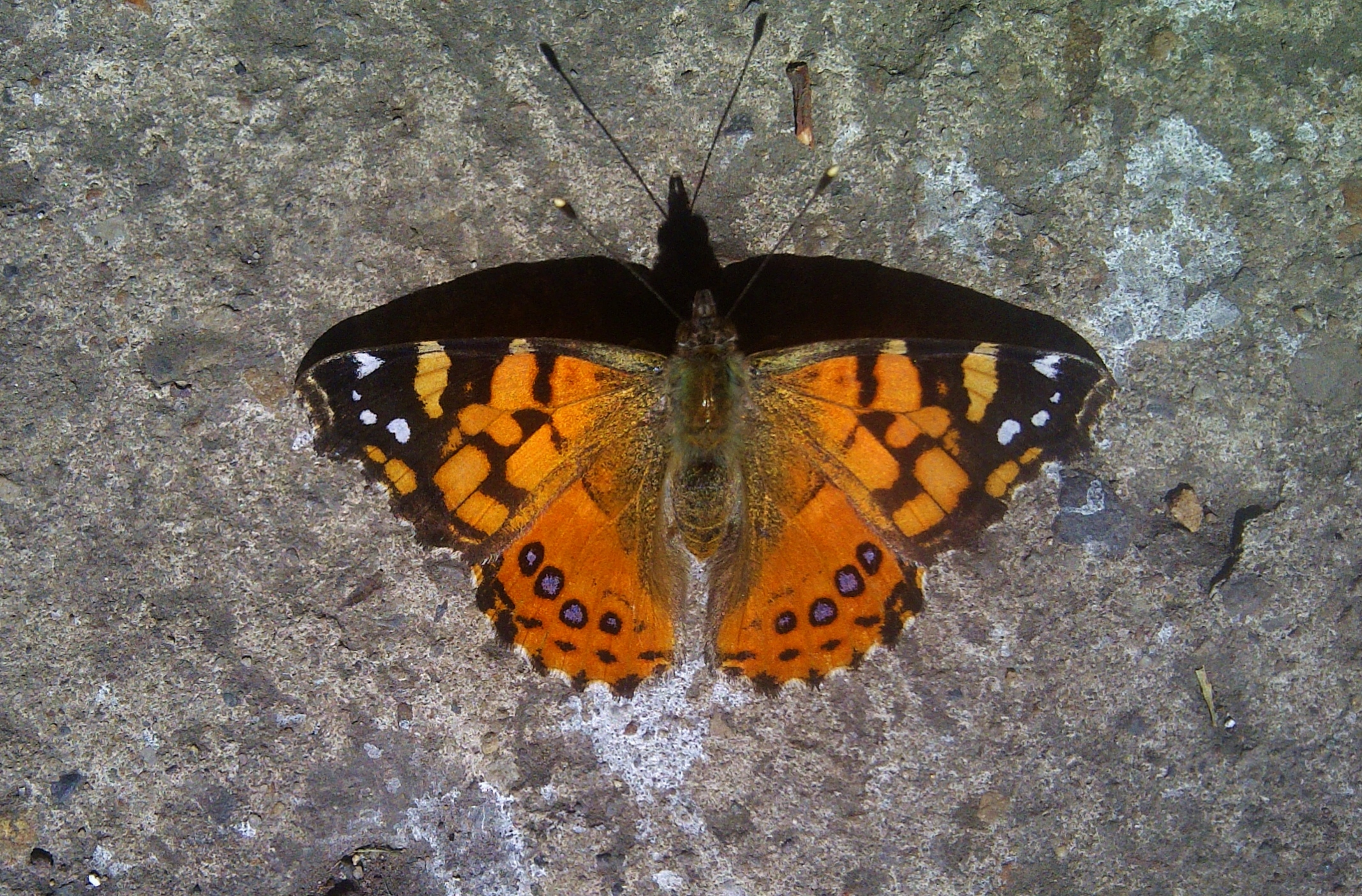 Mariposa de la tarde